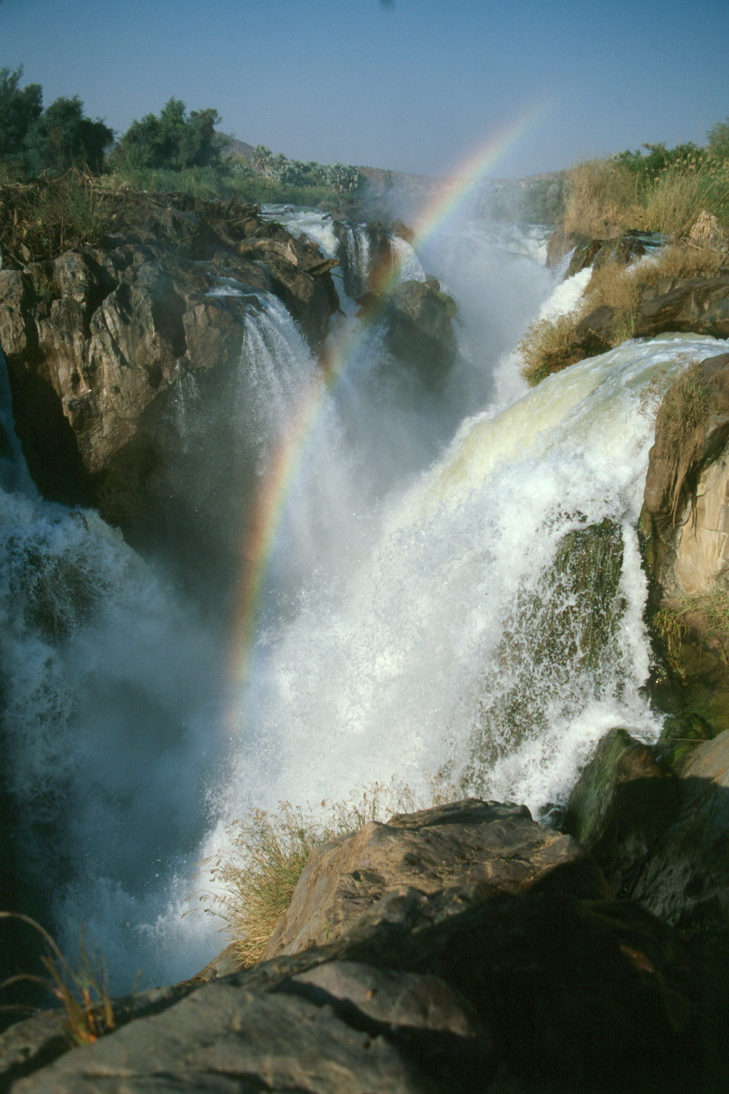 Epupa-Fälle, Kunene, Namibia